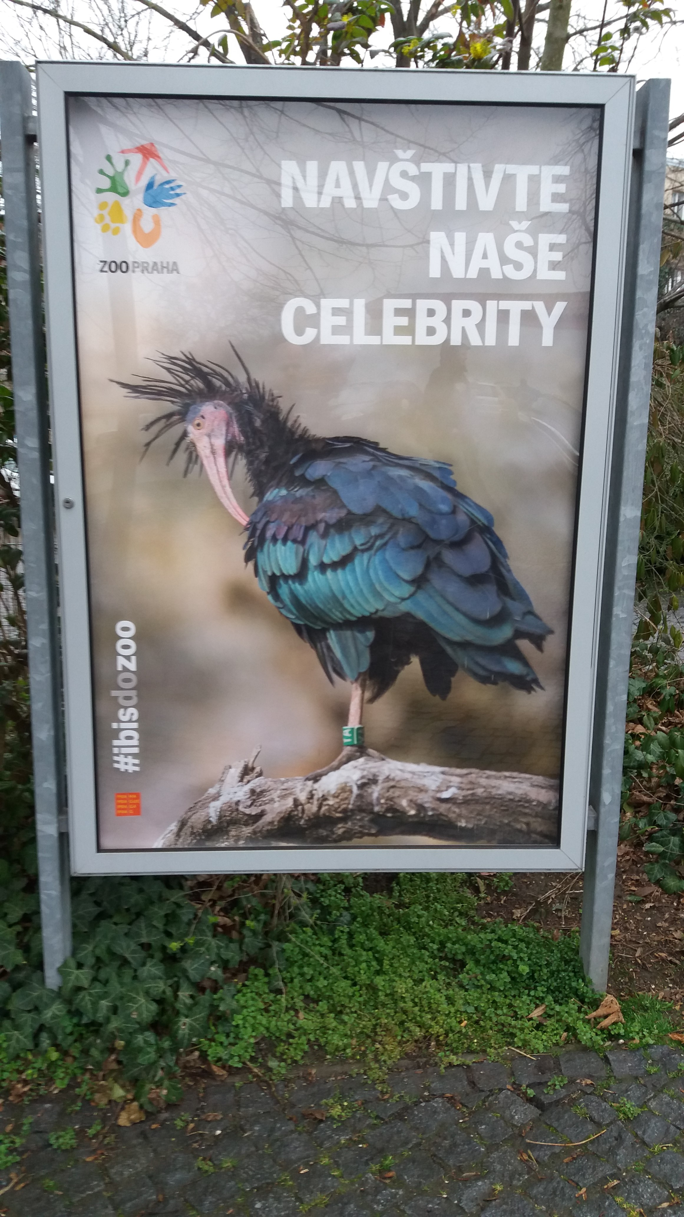 Plakát ibisů skalních zvocích k návštěvě pražské zoologické zahrady.